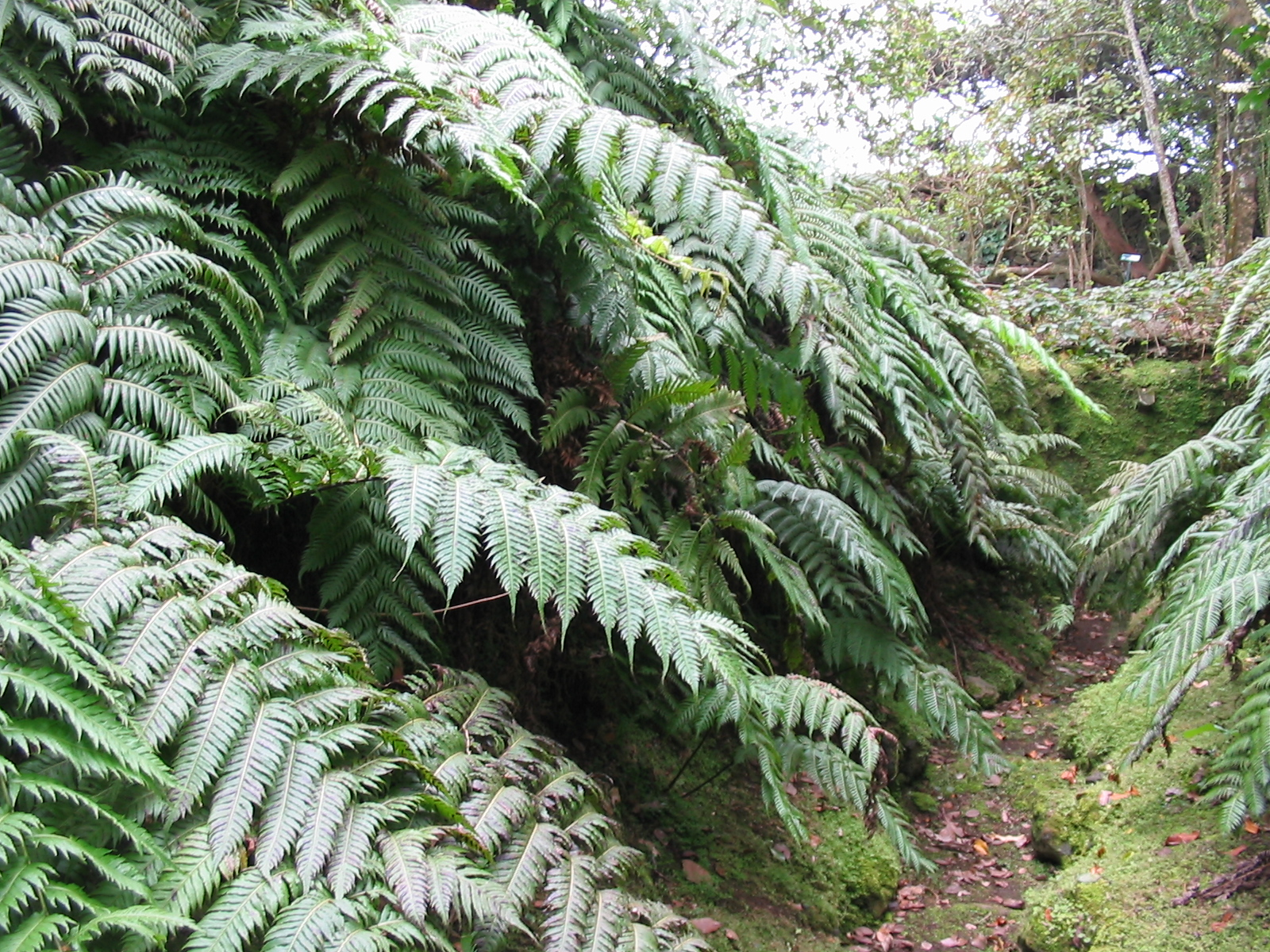 Wurzelnder Kettenfarn (Woodwardia radicans) - Habitus